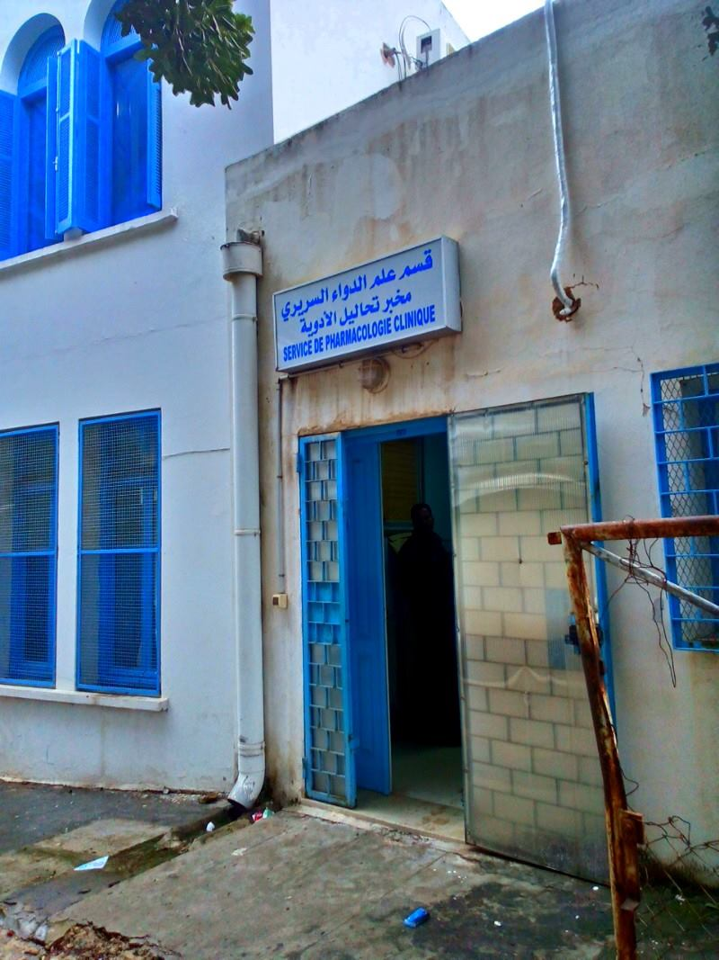 Tunis, Tunisie تونس العاصمة، تونس